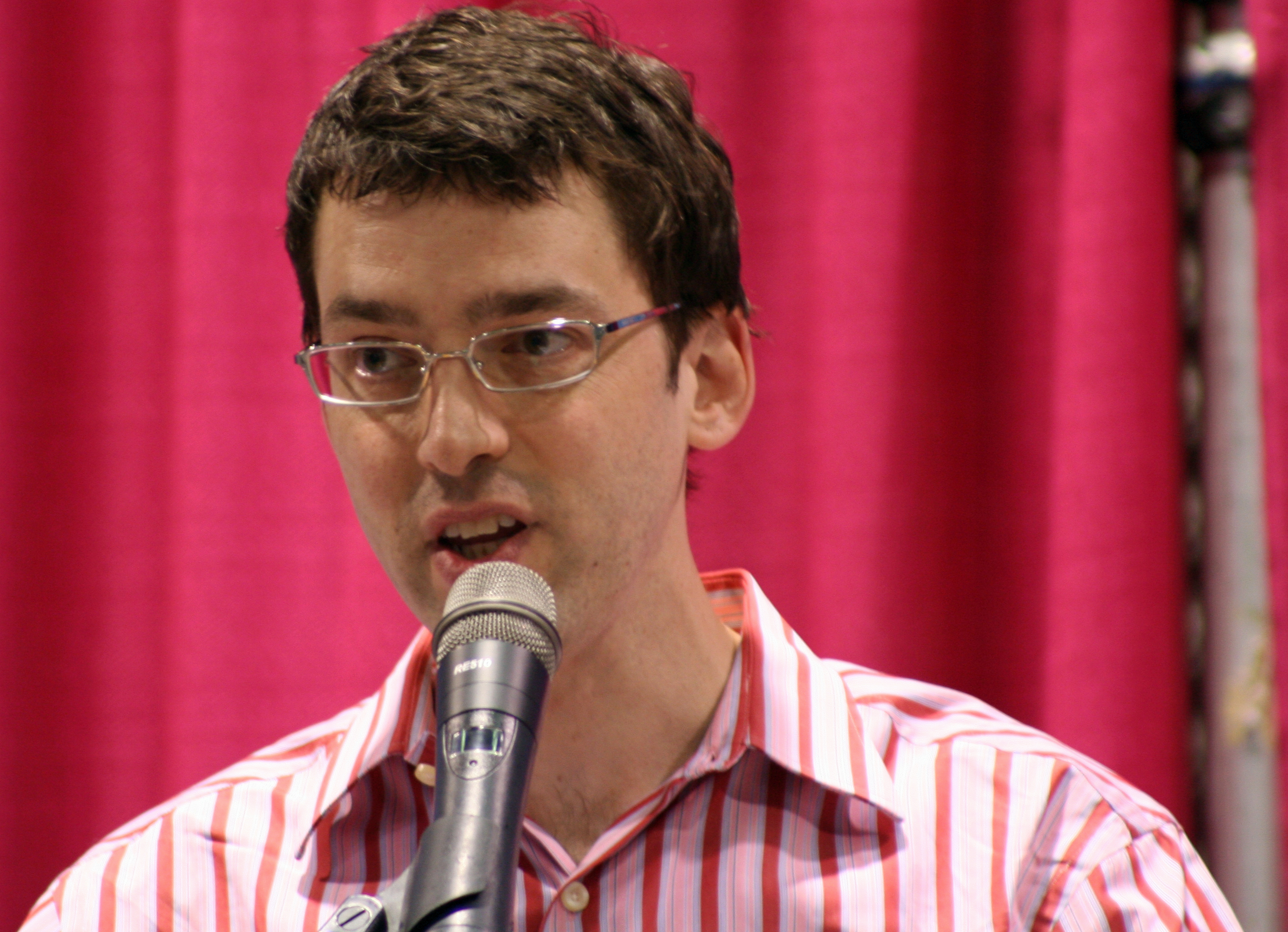 Keir Graff